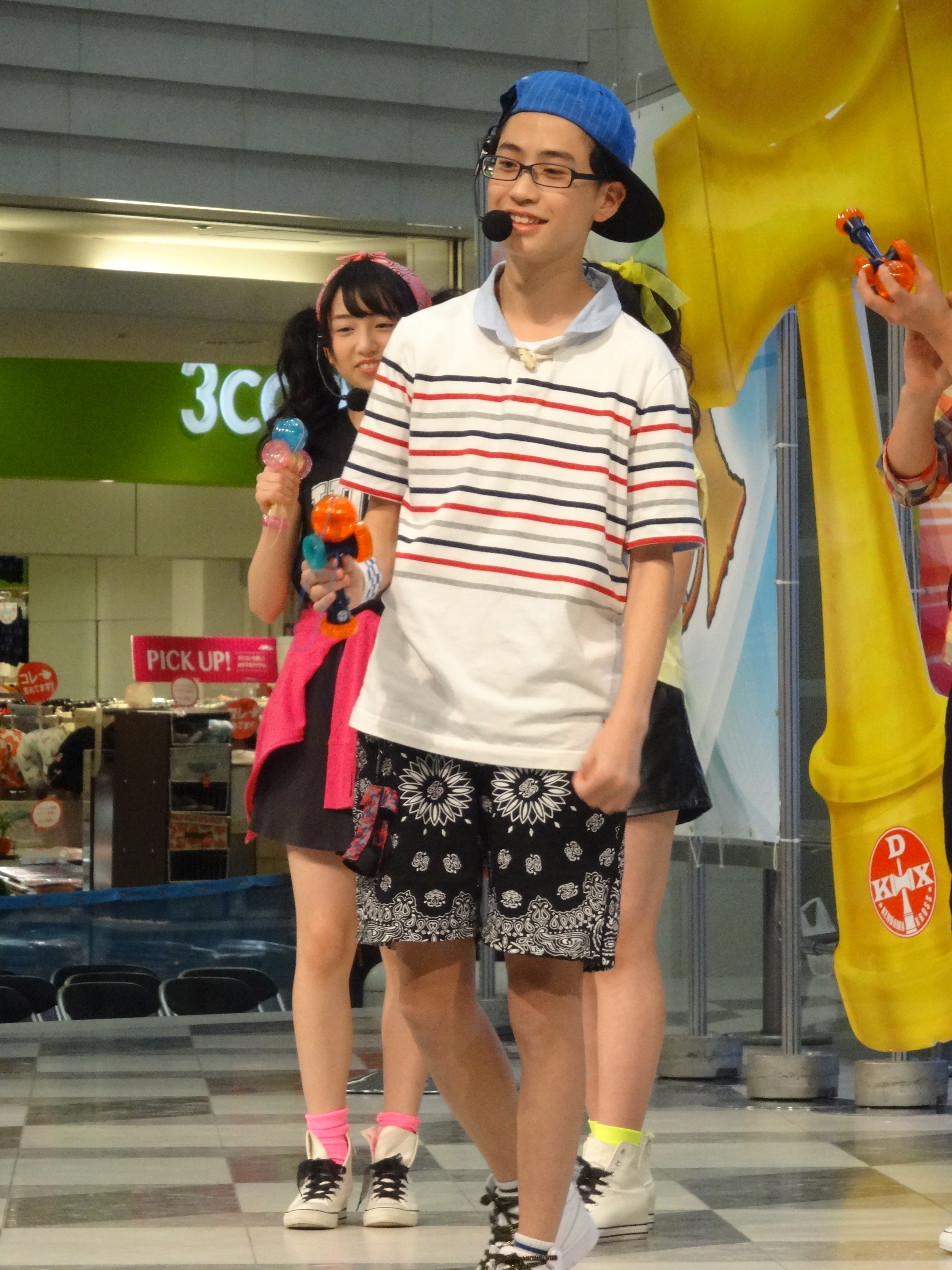 新倉滉祐(おはボーイ)。2015年3月15日にサンシャインシティで行われた『KDX FES 日本一決定戦』にて。左端後ろ側に写ってるのは川鍋朱里(おはガールふわわ)。